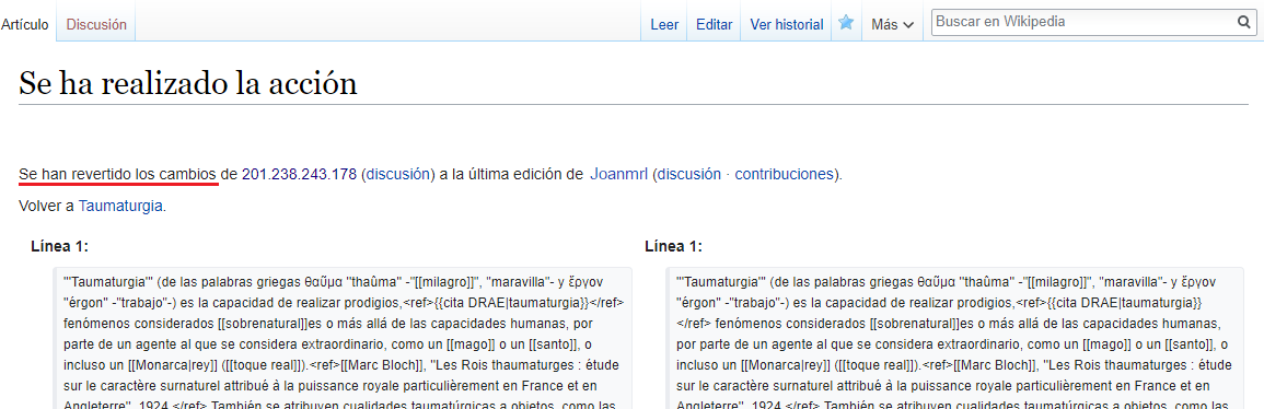 Resultado de uso de herramienta "revertir" de Wikipedia en español.